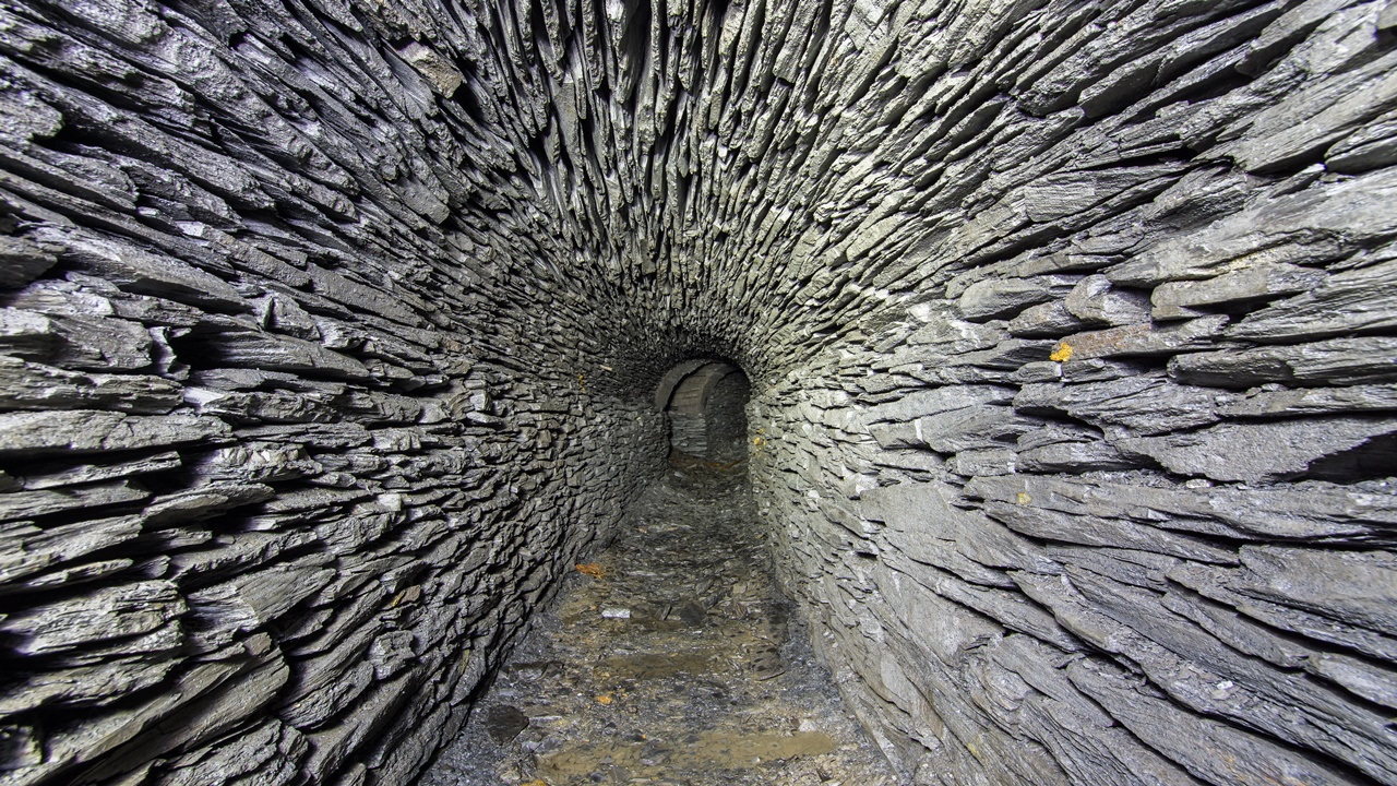 Versatzmauer innen